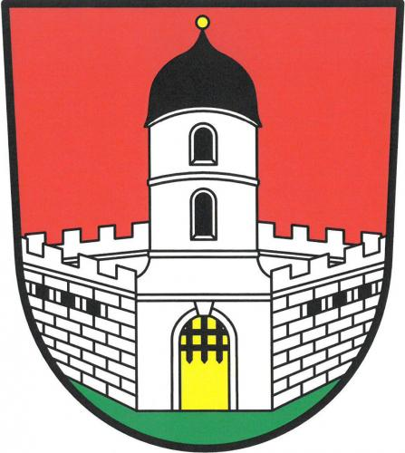 Větrný Jeníkov. znak obce